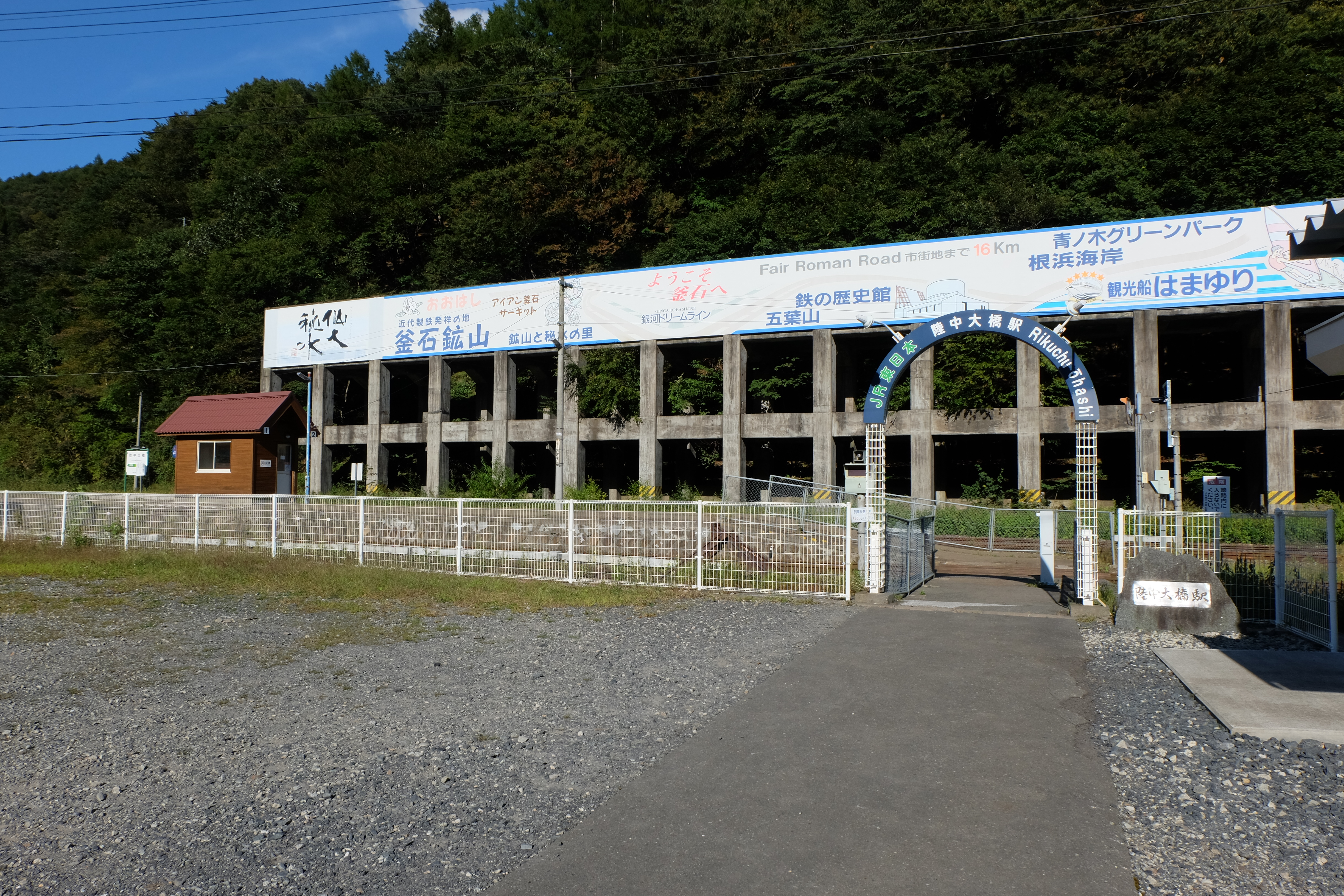 陸中大橋駅 駅前の様子